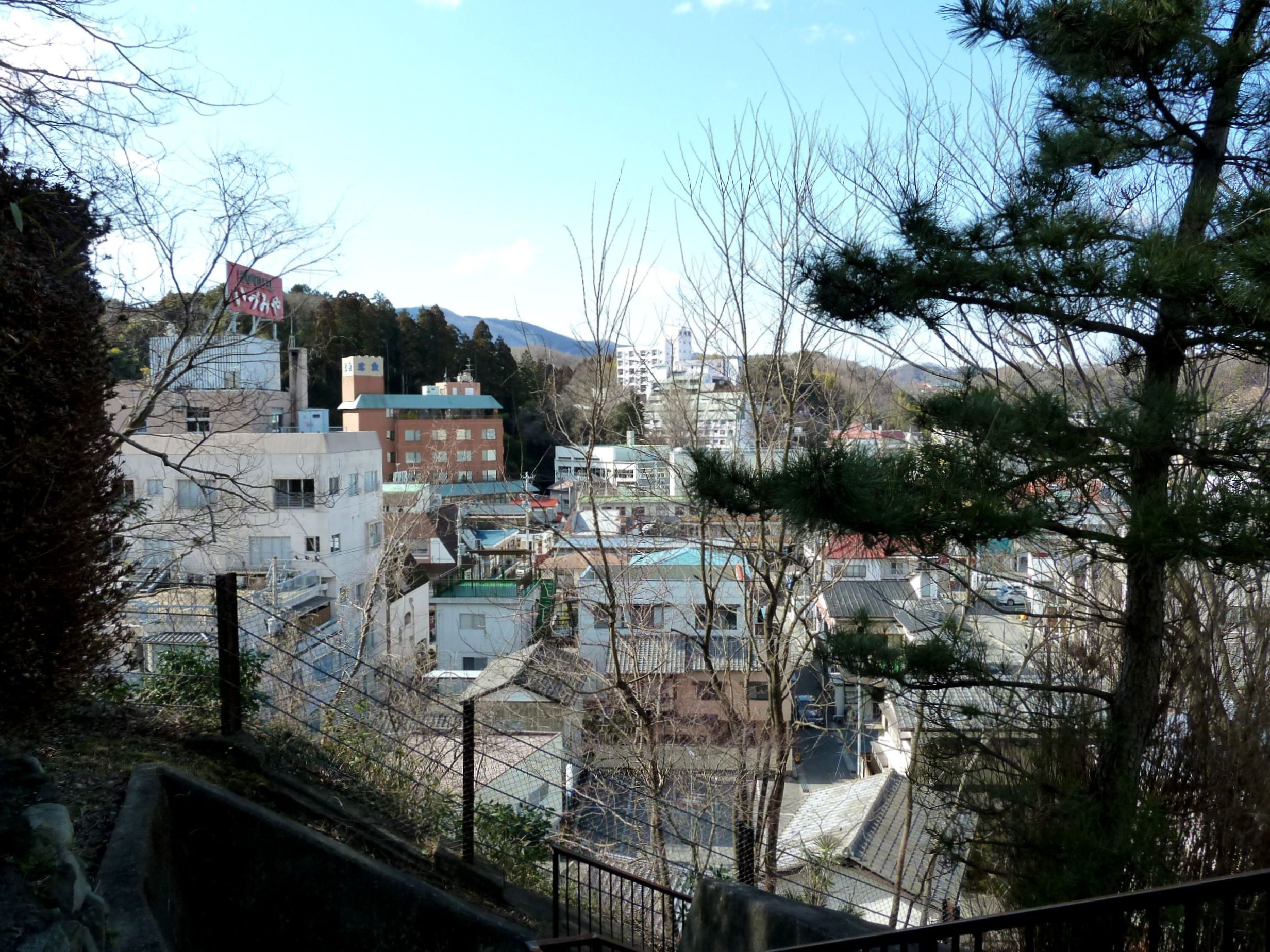 いわき湯本温泉街